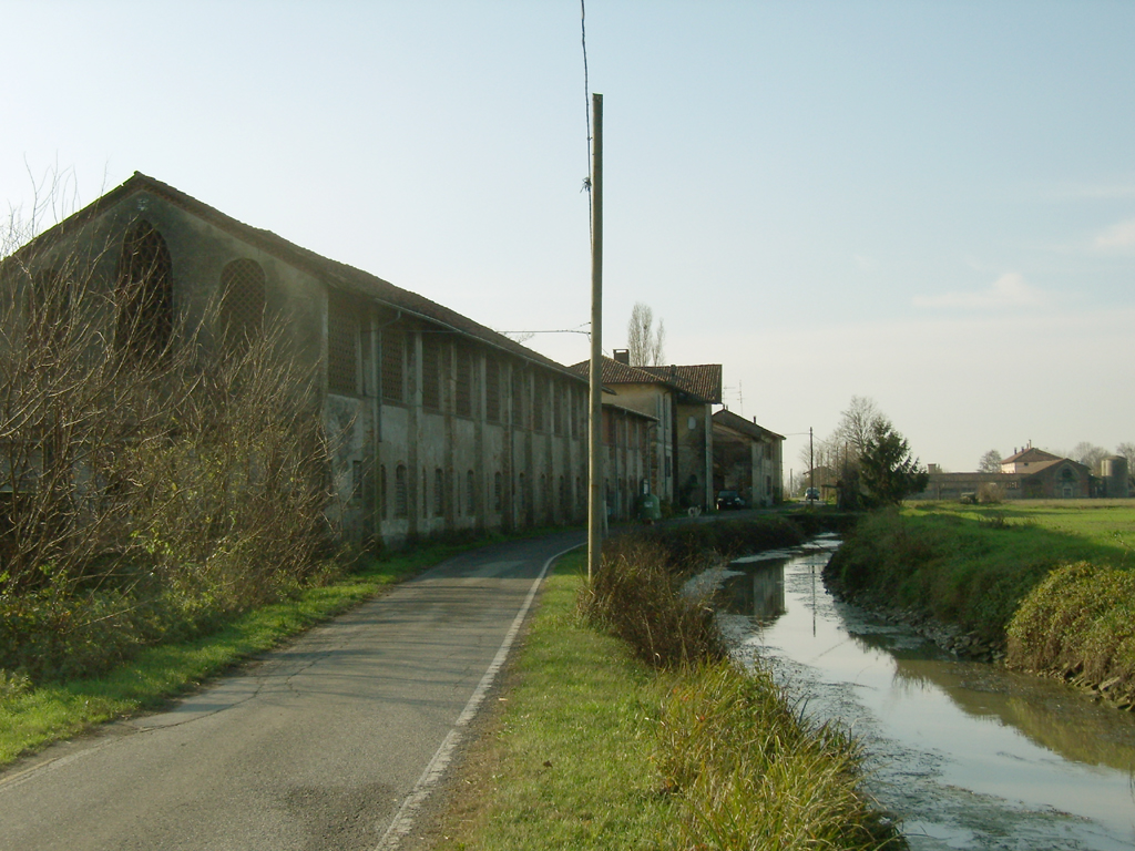 Vista della cascina Campolungo nel comune di Cornegliano Laudense